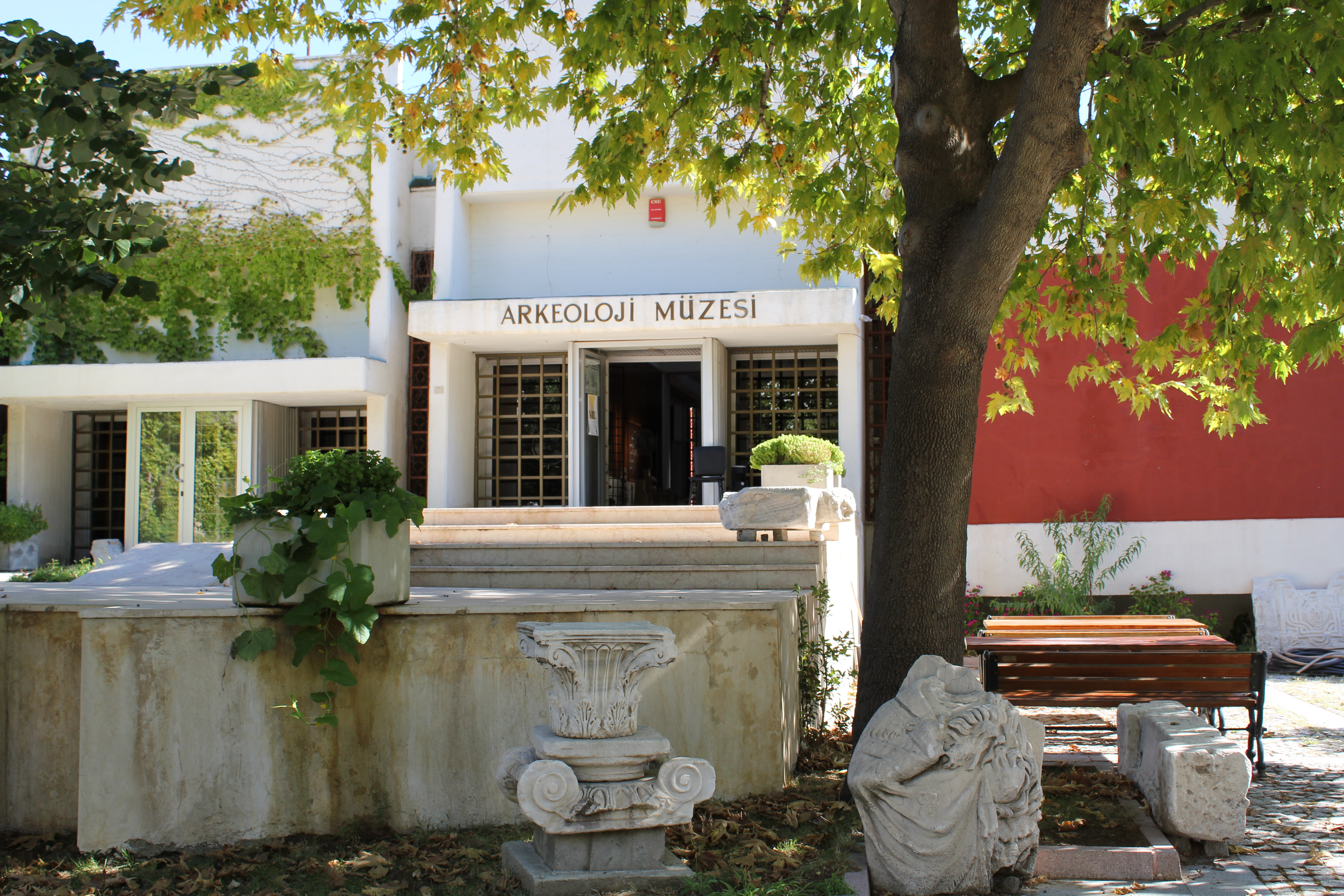 Museum Çanakkale, Westtürkei, Eingang